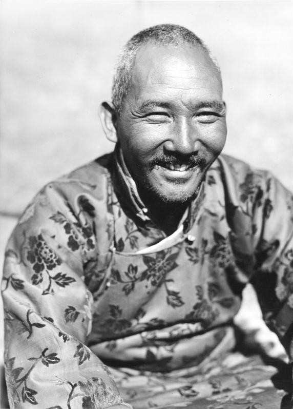 Tibetexpedition, Tibeter, Möndro Lhasa, Mr. K. K. Möndo [Möndo, Möndro]